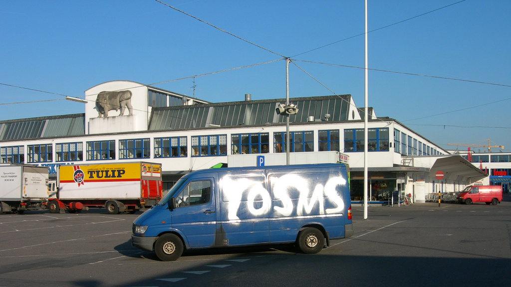 Den Hvide Kødbye, Vesterbro KBH. 2008.